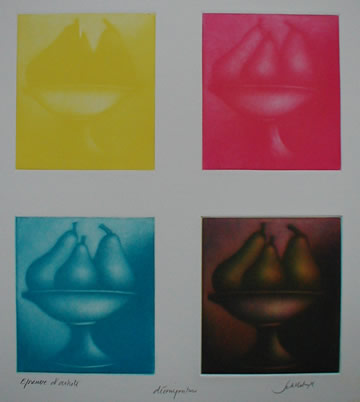 Laurent Schkolnyk, « Decomposition », manière noire en couleurs montrant le procédé utilisé : la trichromie.